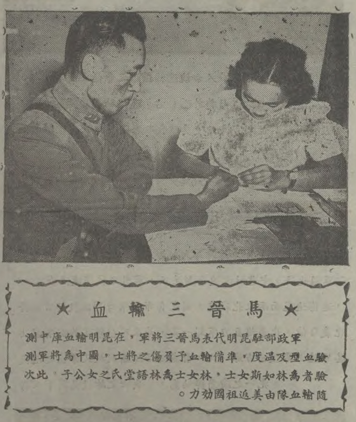 中文（台灣）: 馬晉三輸血 《聯合畫報》 1944年[ 第96期 ，1頁]